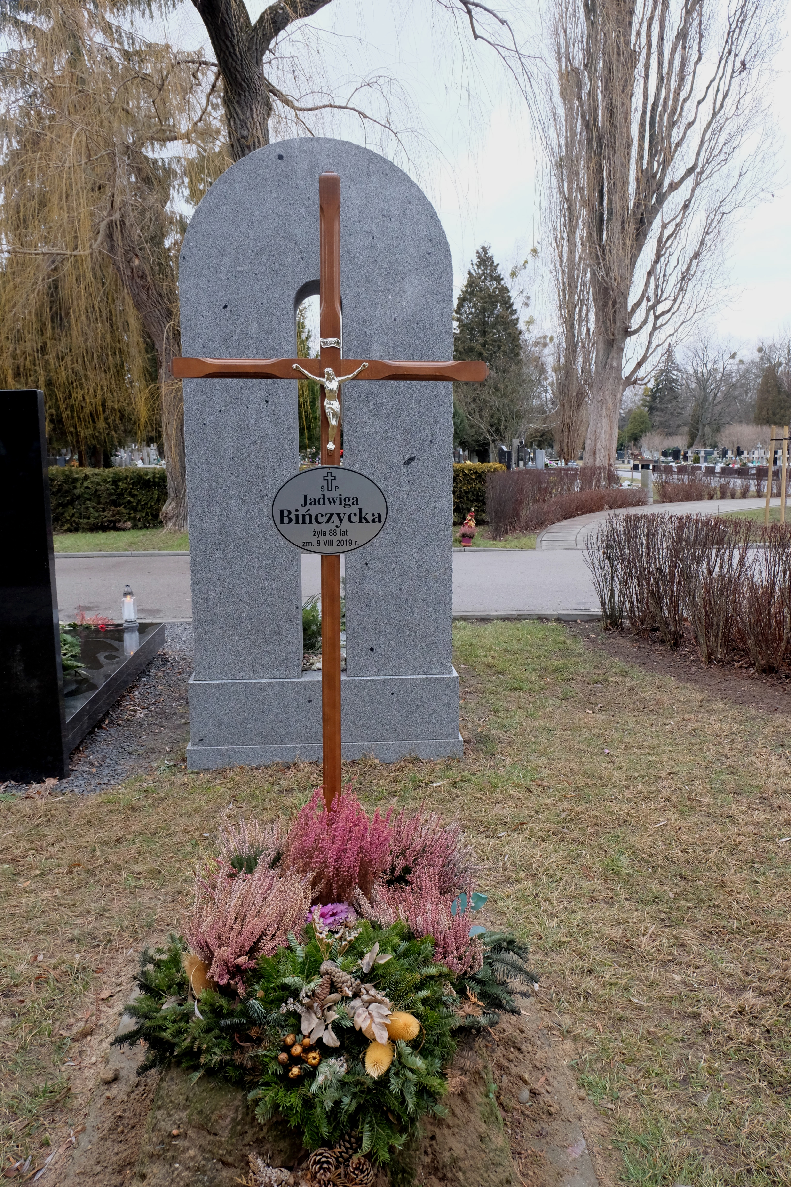 Grób prof. Jadwigi Bińczyckiej na Cmentarzu Wojskowym na Powązkach w Warszawie